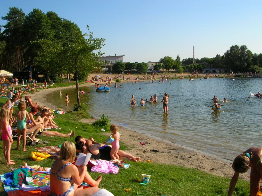 Jezioro Jezuickie k. Bydgoszczy, plaża w Pieckach